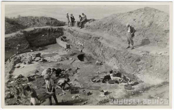 Arheoloogilised väljakaevamised Daugmale linnamäel